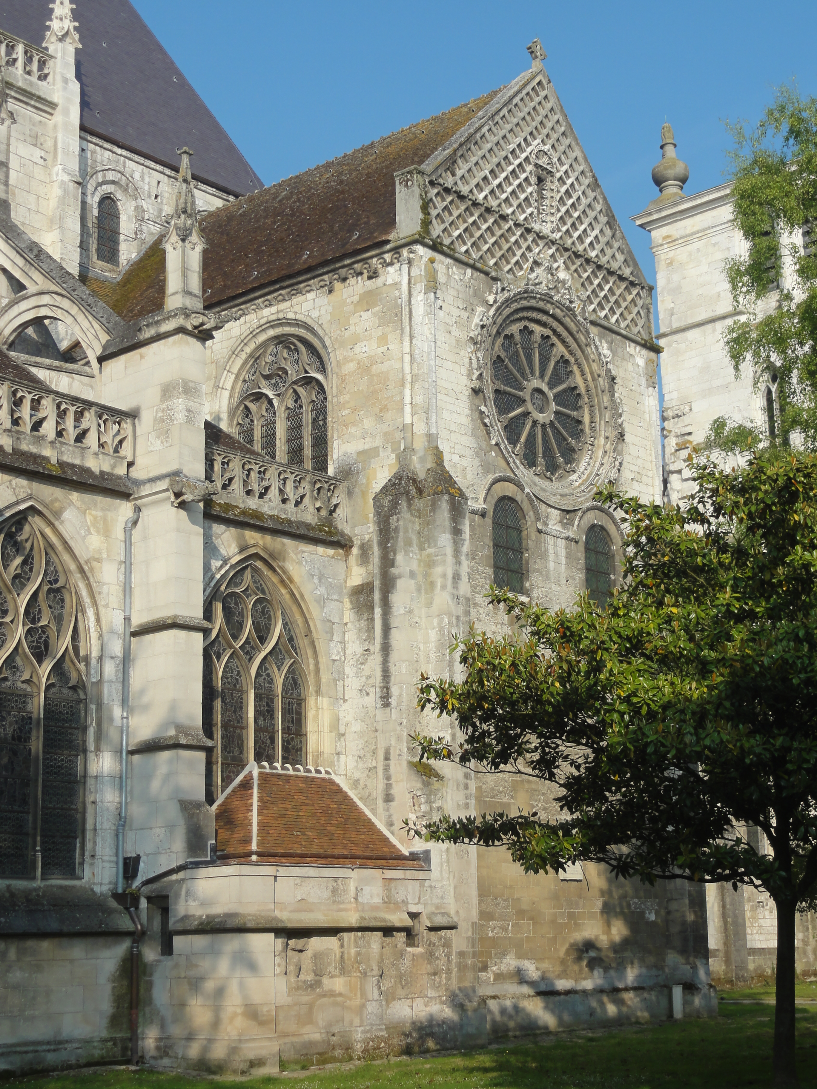 Croisillon nord, vue depuis le nord-est.